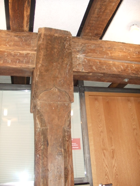 Veringenstadt, Landkreis Sigmaringen Rathaus Veringenstadt: Holzkonstruktion. Tragende Balken im Innern.